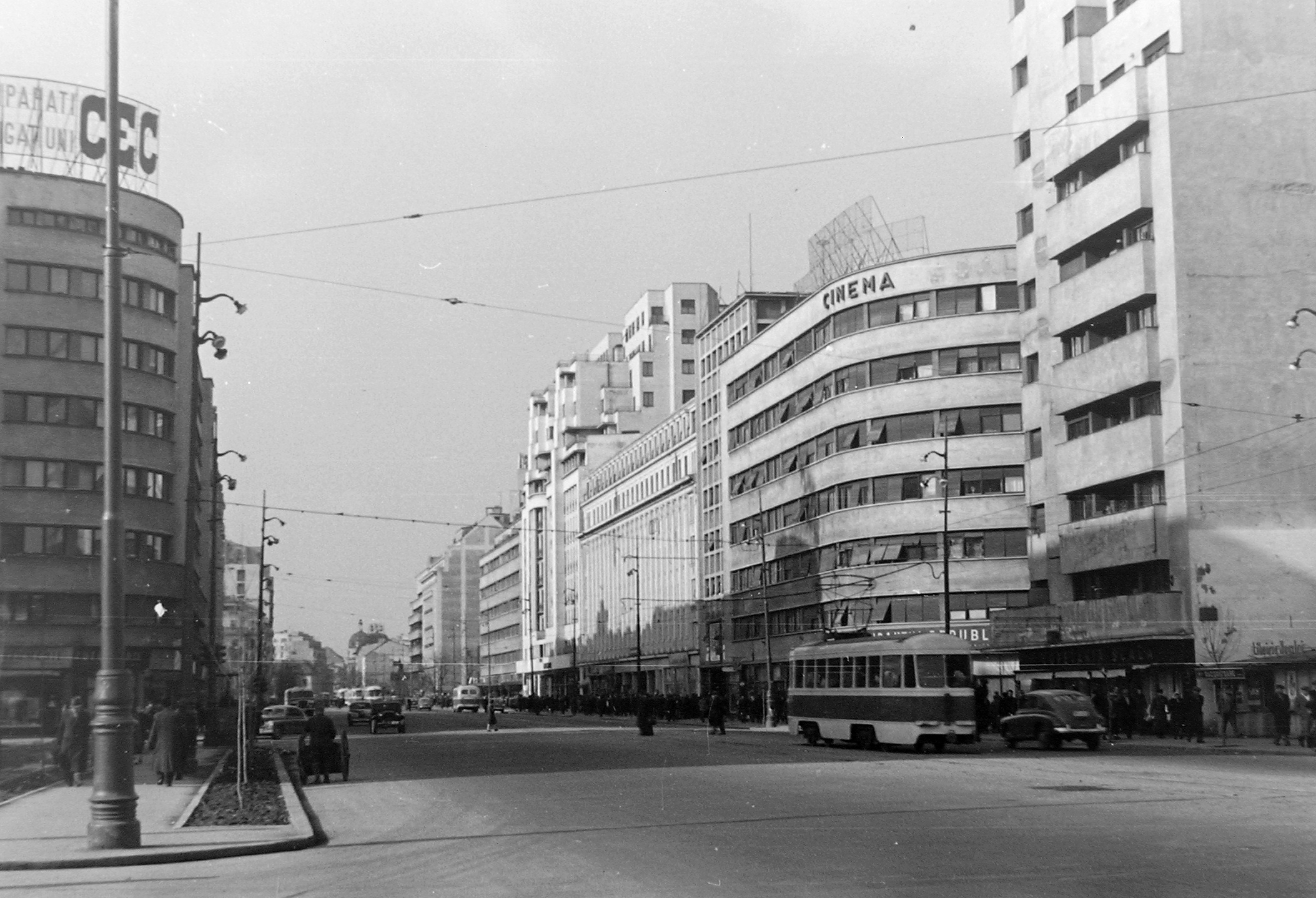 Strada Republicii (Bulevardul General Gheorghe Magheru) a Strada C. A. Rosetti kereszteződésétől nézve. Location: Romania, Bucharest Tags: tram Title: Strada Republicii (Bulevardul General Gheorghe Magheru) a Strada C. A. Rosetti kereszteződésétől nézve.